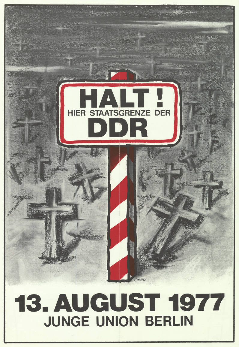 Halt! Hier Staatsgrenze der DDR 13. August 1977 Junge Union Berlin Abbildung: Grenzpfahl - Gräberfeld mit Kreuzen (Grafik) Kommentar: Plakat zum 16. Jahrestag des Mauerbaus in Berlin Plakatart: Motiv-/Textplakat Künstler_Grafiker: Gero Hilliger Auftraggeber: JU Berlin Objekt-Signatur: 10-028 : 43 Bestand: Plakate von Jugendorganisationen der Parteien ( 10-028) GliederungBestand10-18: Plakate von Jugendorganisationen der Parteien (10-028) » CDU » Motiv- und Textplakate Lizenz: KAS/ACDP 10-028 : 43 CC-BY-SA 3.0 DE